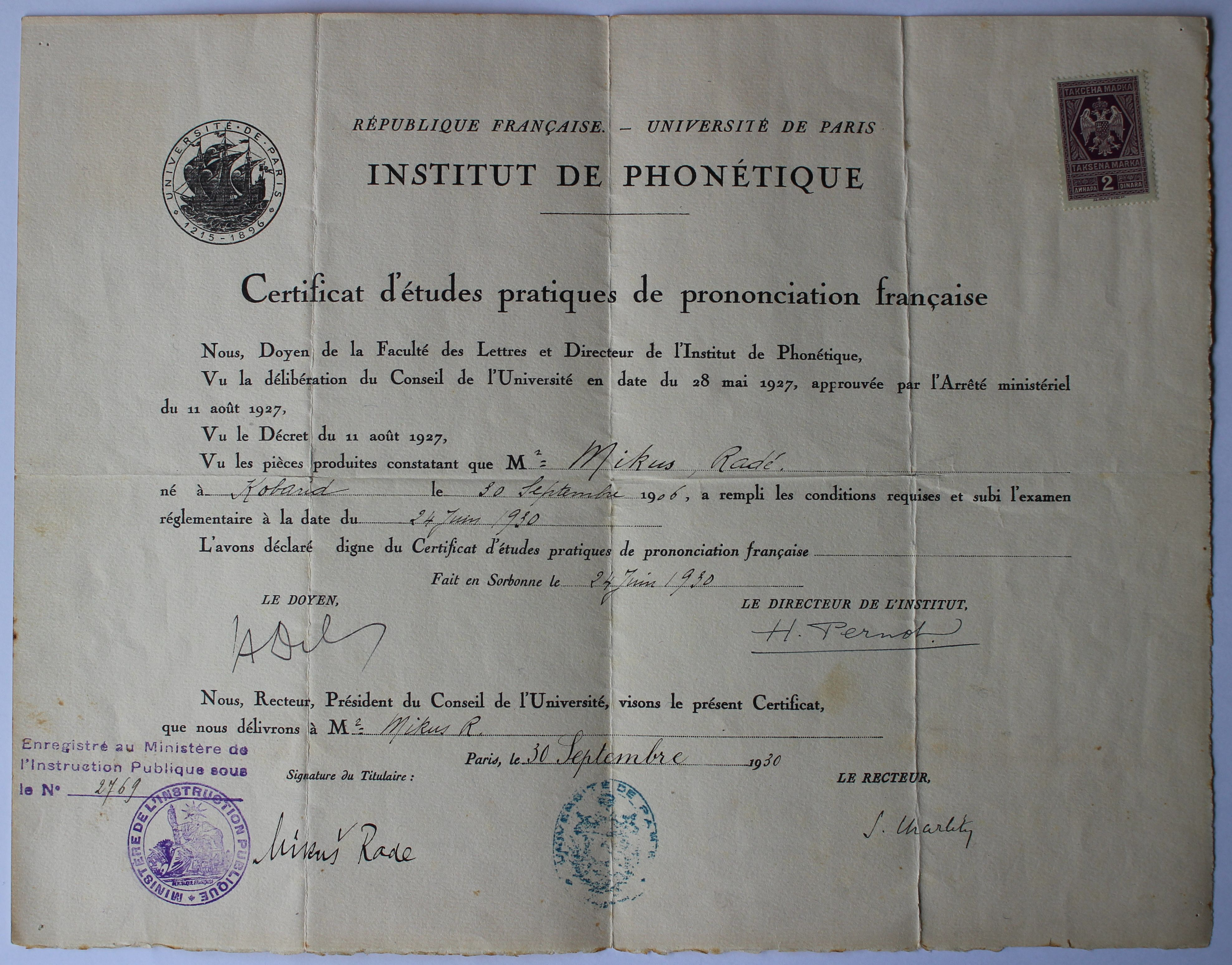 Certificat d'études pratiques de prononciation française de Radivoj Franciscus Mikuš